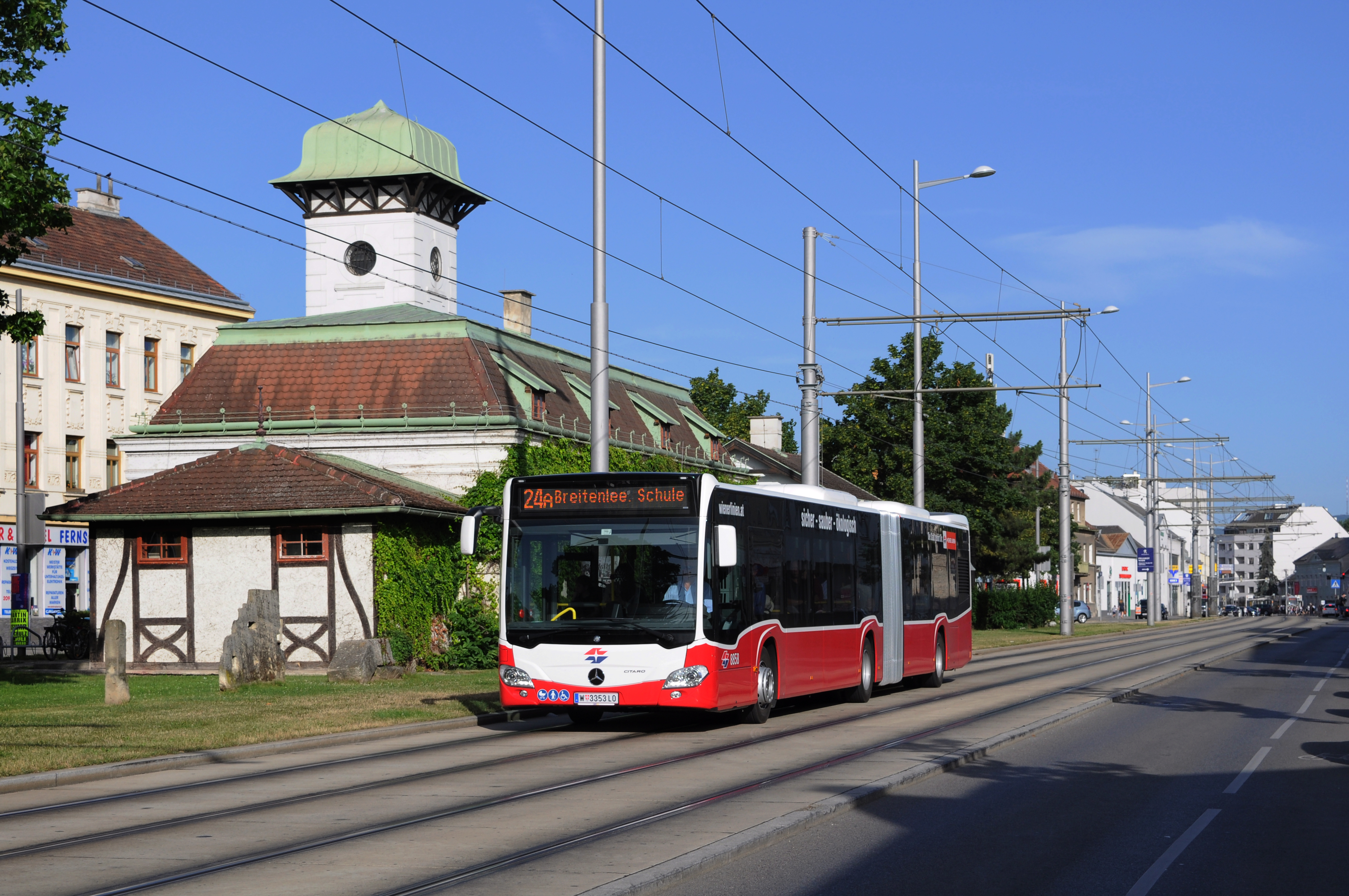 Mercedes Citaro 2 (NG 265 MB) Nr. 8858 als Linie 24A nach Breitenlee am Kagraner Platz. Im Hintergrund befindet sich das Bezirksmuseum Donaustadt.